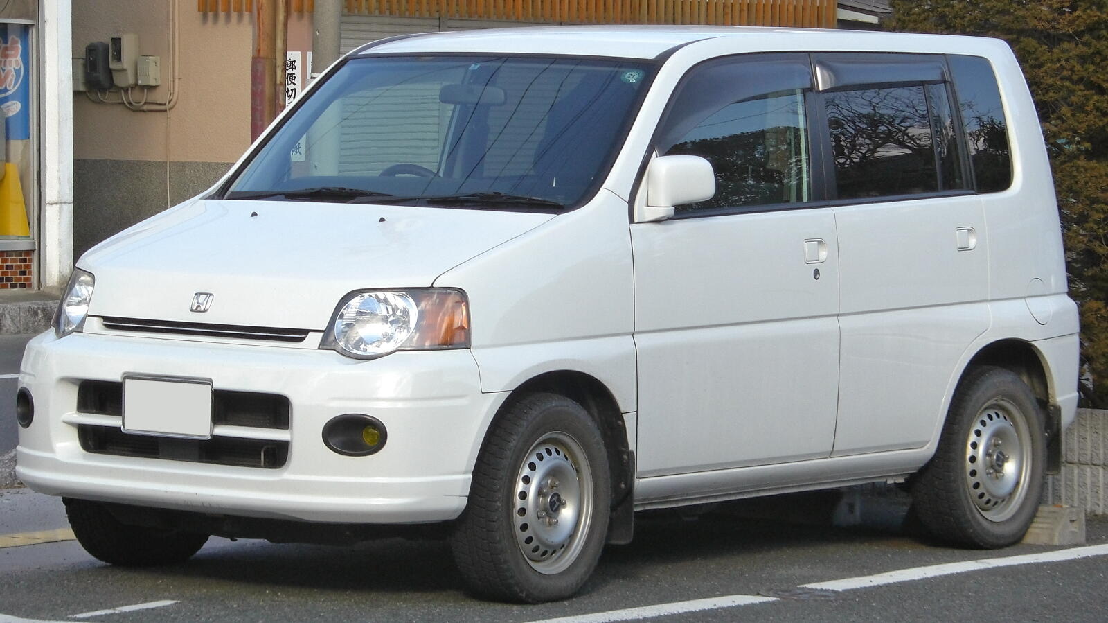 ホンダ・S-MX（後期型）